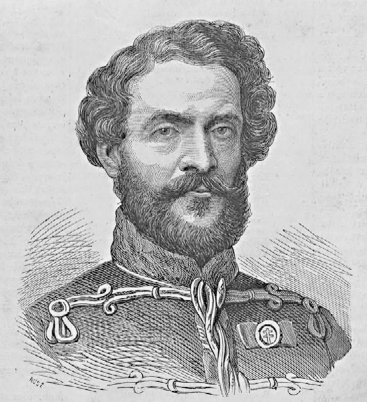 Asztalos Sándor (1823–1857) honvéd alezredes. Rusz Károly metszete (Vasárnapi Ujság, 1870. március 27.)